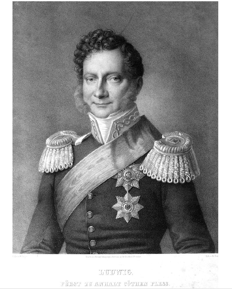 Porträt des Fürsten Ludwig von Anhalt-Köthen-Pless (1783–1841)